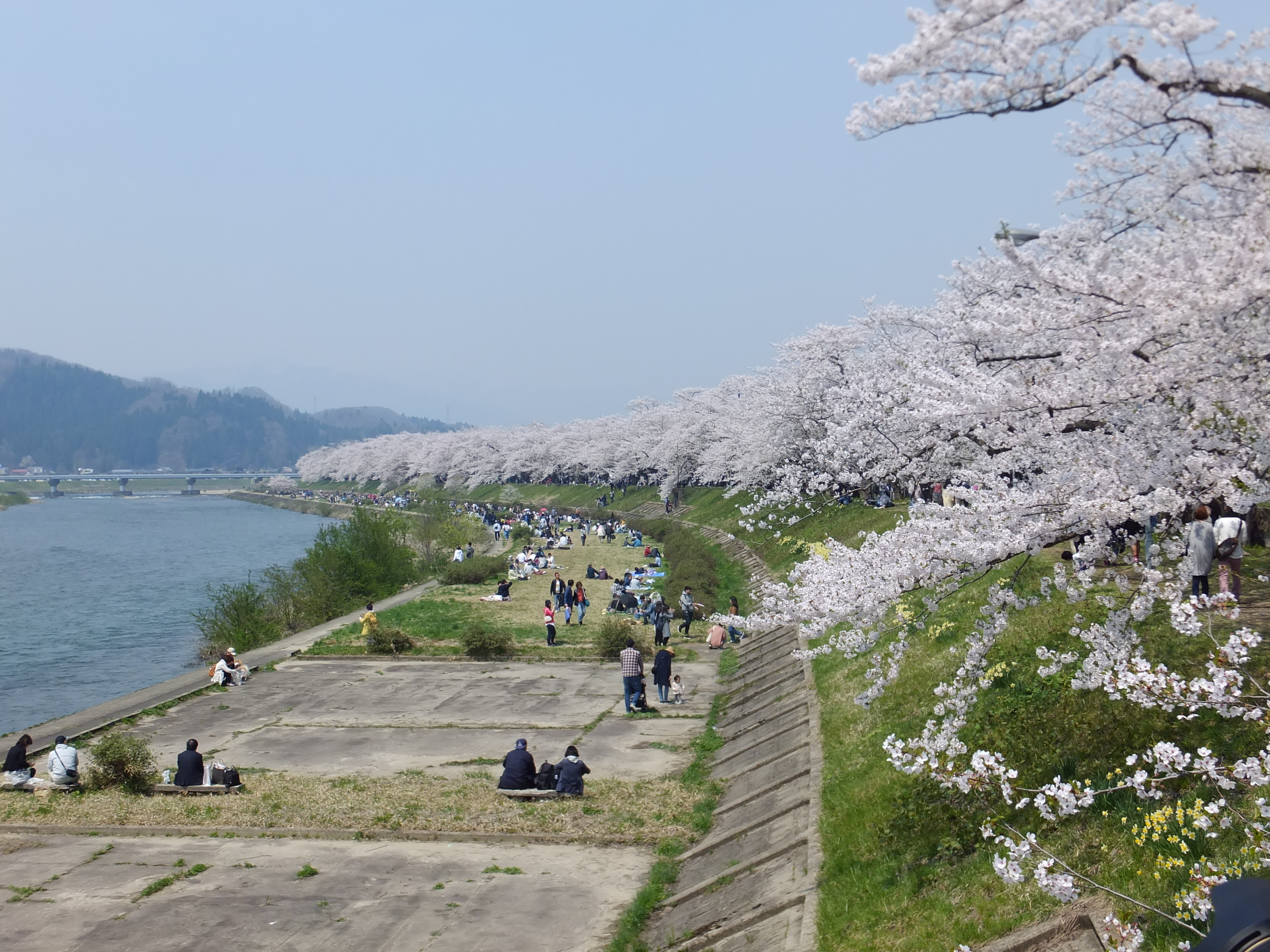 秋田県仙北市角館、桧木内川の築堤にて。ソメイヨシノの並木が約2kmに渡って続き、国の名勝に指定されている。